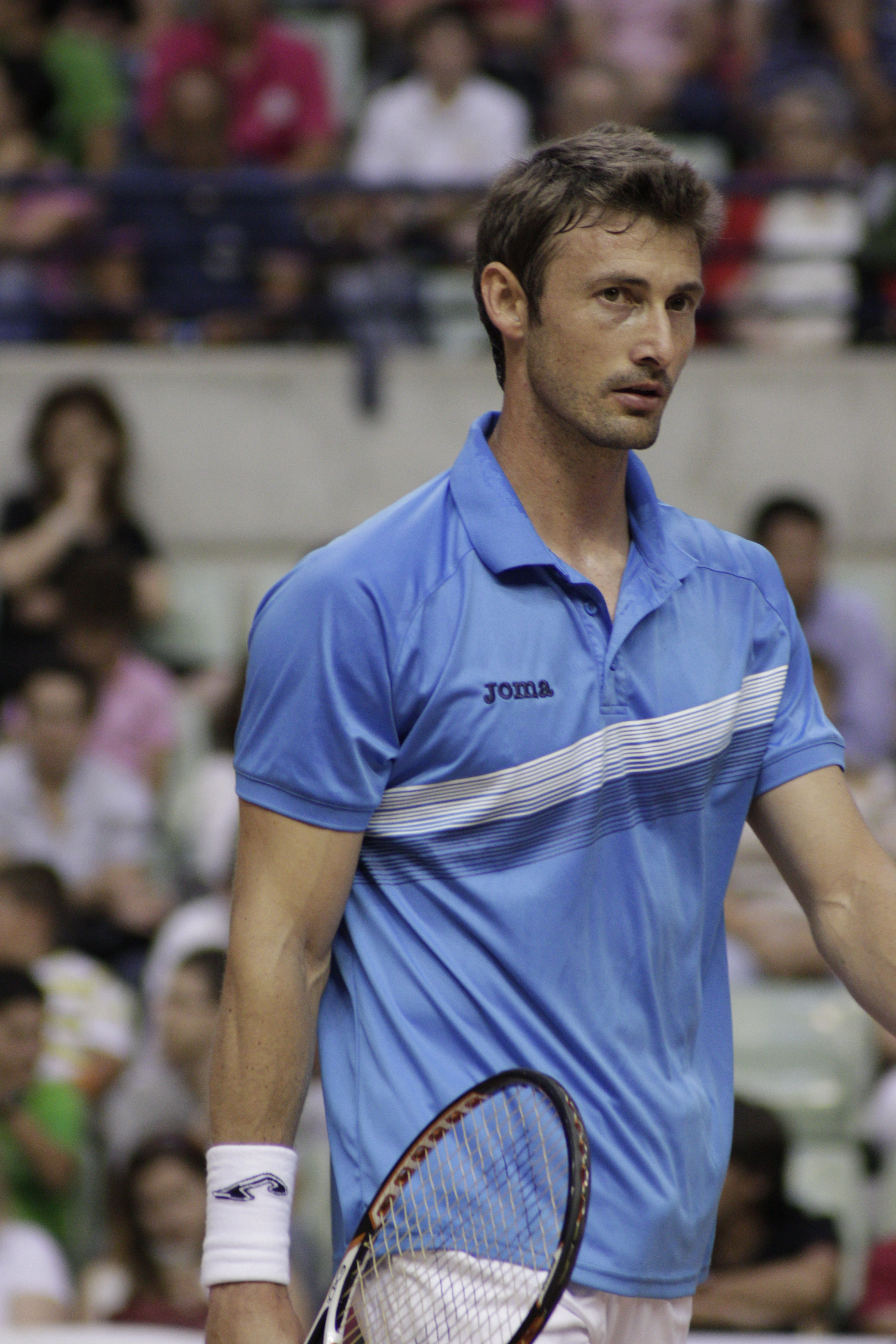 Almagro - Ferrero Partido en beneficio de los damnificados por el terremoto en Lorca